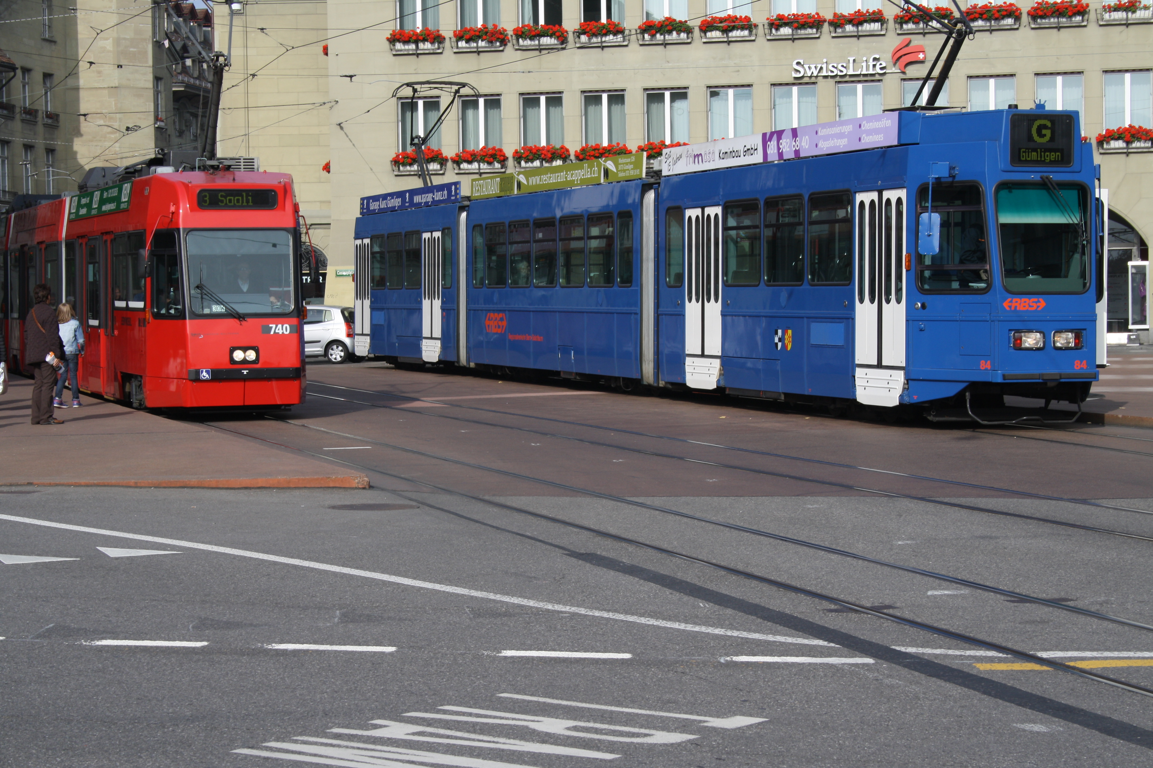 Zug der Linie G in Bern Endhaltestelle Zytglogge